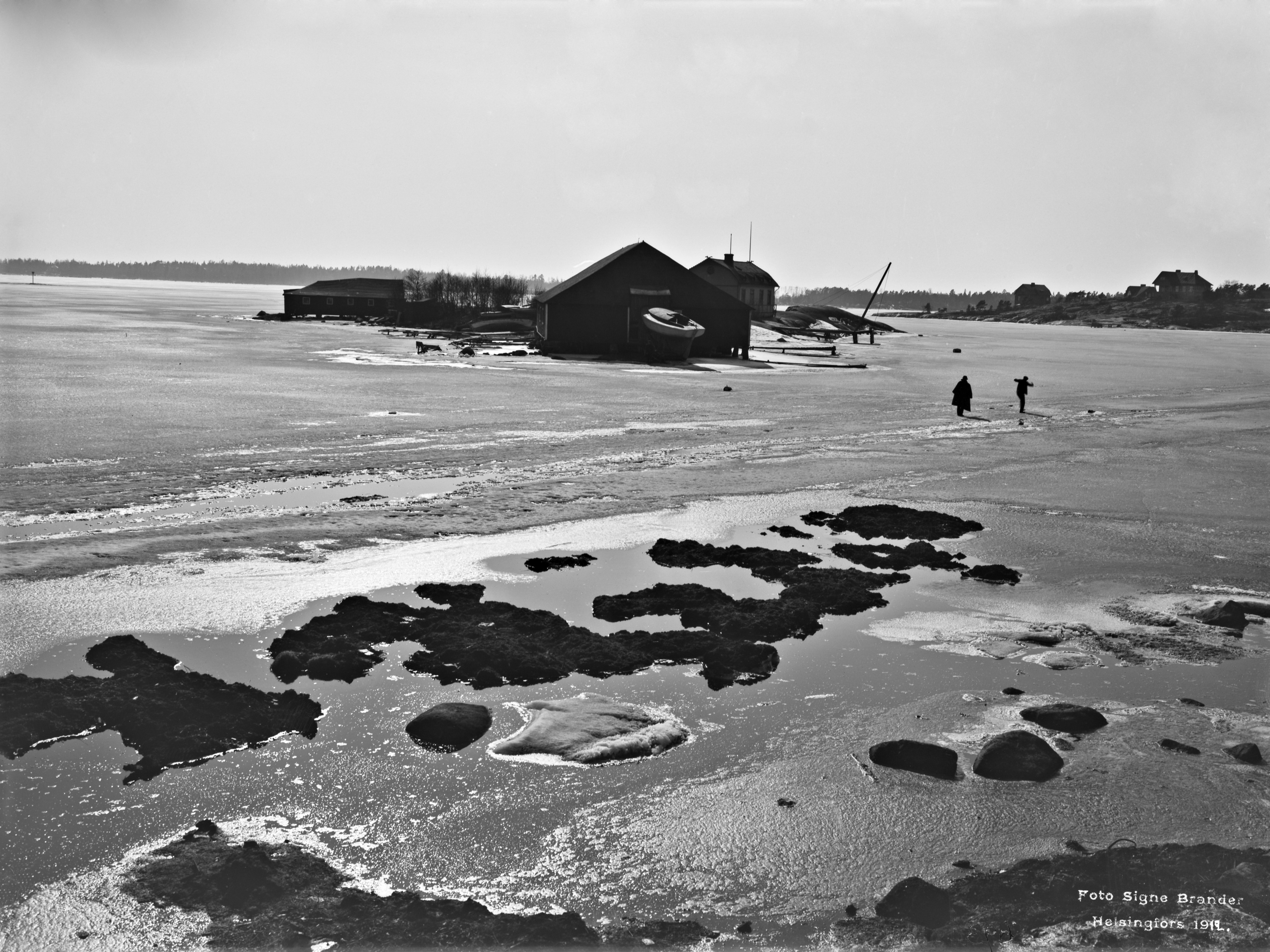 Kellosaari, oikealla Salmisaari. Kellosaarella Helsingfors Arbetare Segelklubb (HASK, vuodesta 1919 Helsingfors Segelklubb HSK) 1900-luvun alusta vuoteen 1924 asti.. -- negatiivi ja vedos, lasi paperi pahvi, mv